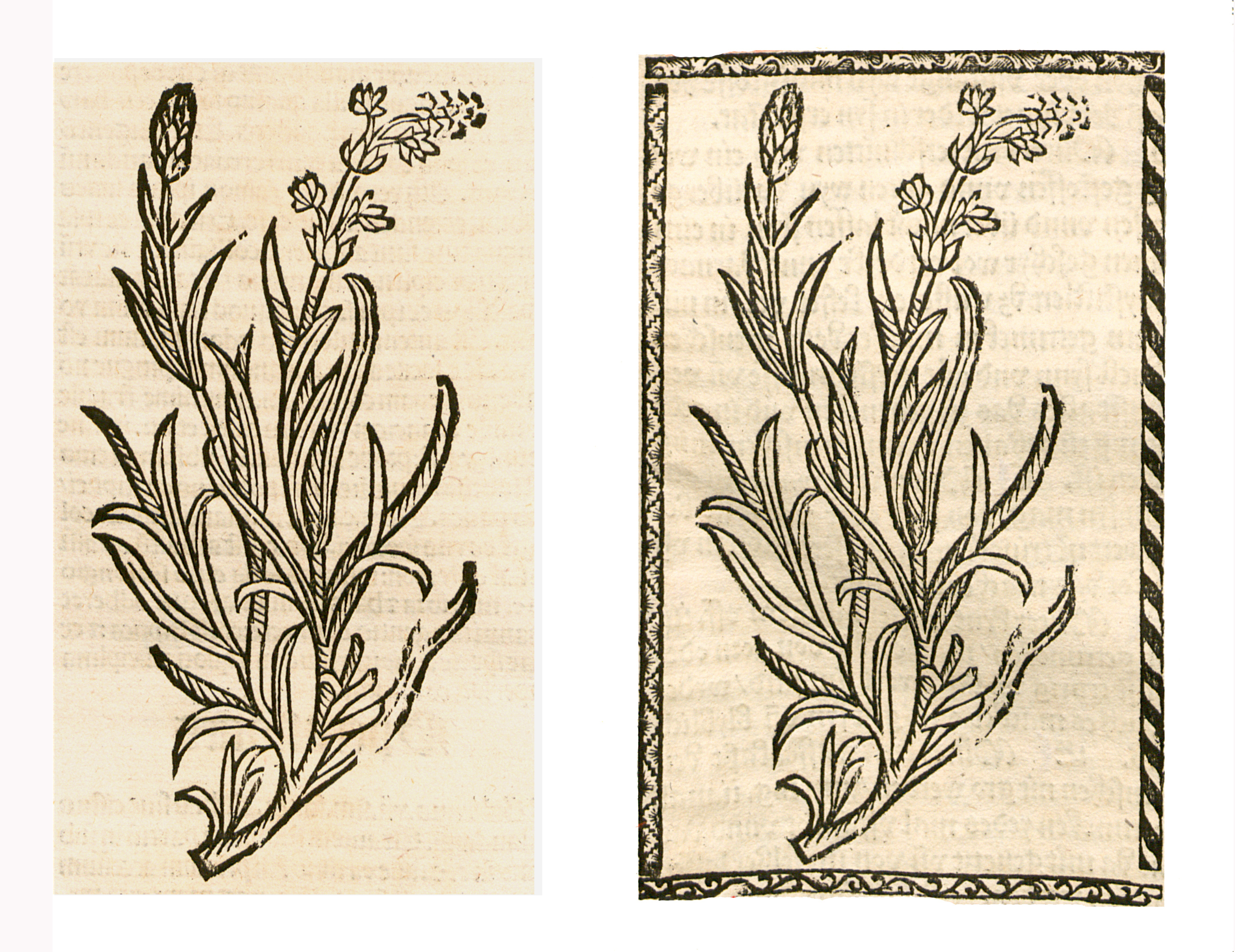 Abbildung von: Lavender (Lavandula spec.)